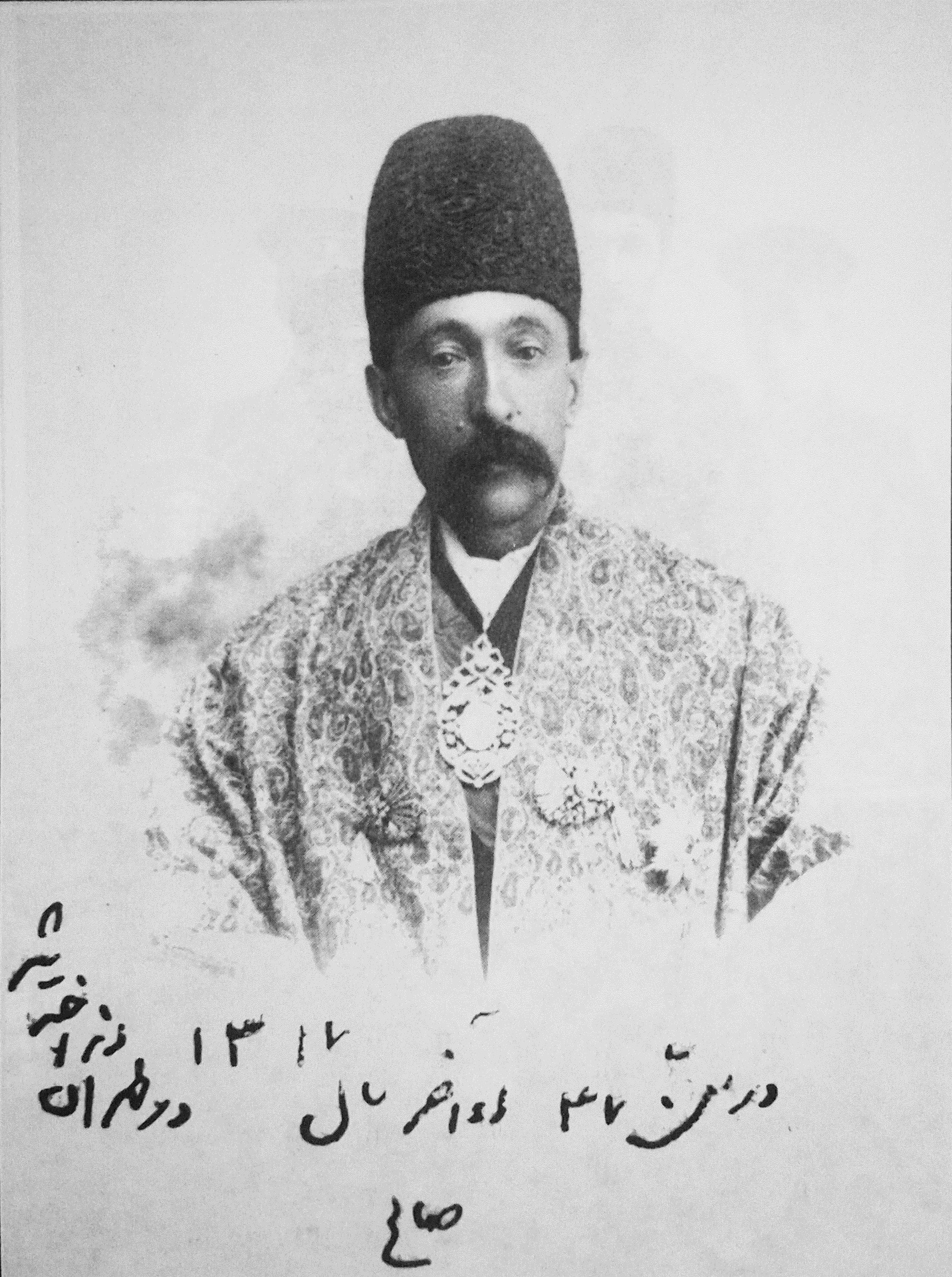 میرزا صالح خان آصف‌الدوله، جد اعلای خانواده امیرکبیریان